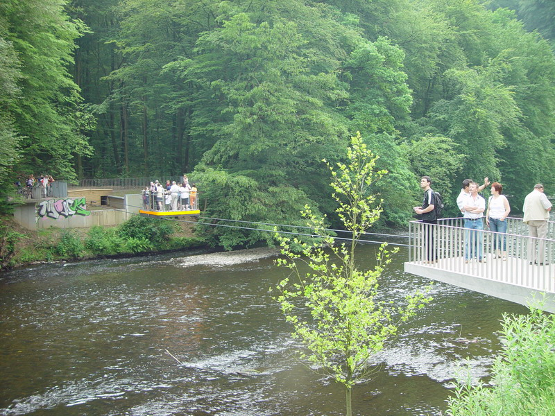 Die Schwebefähre über die Wupper im Müngstener Brückenpark zwischen Solingen und Remscheid